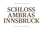 Logo Schloss Ambras Innsbruck